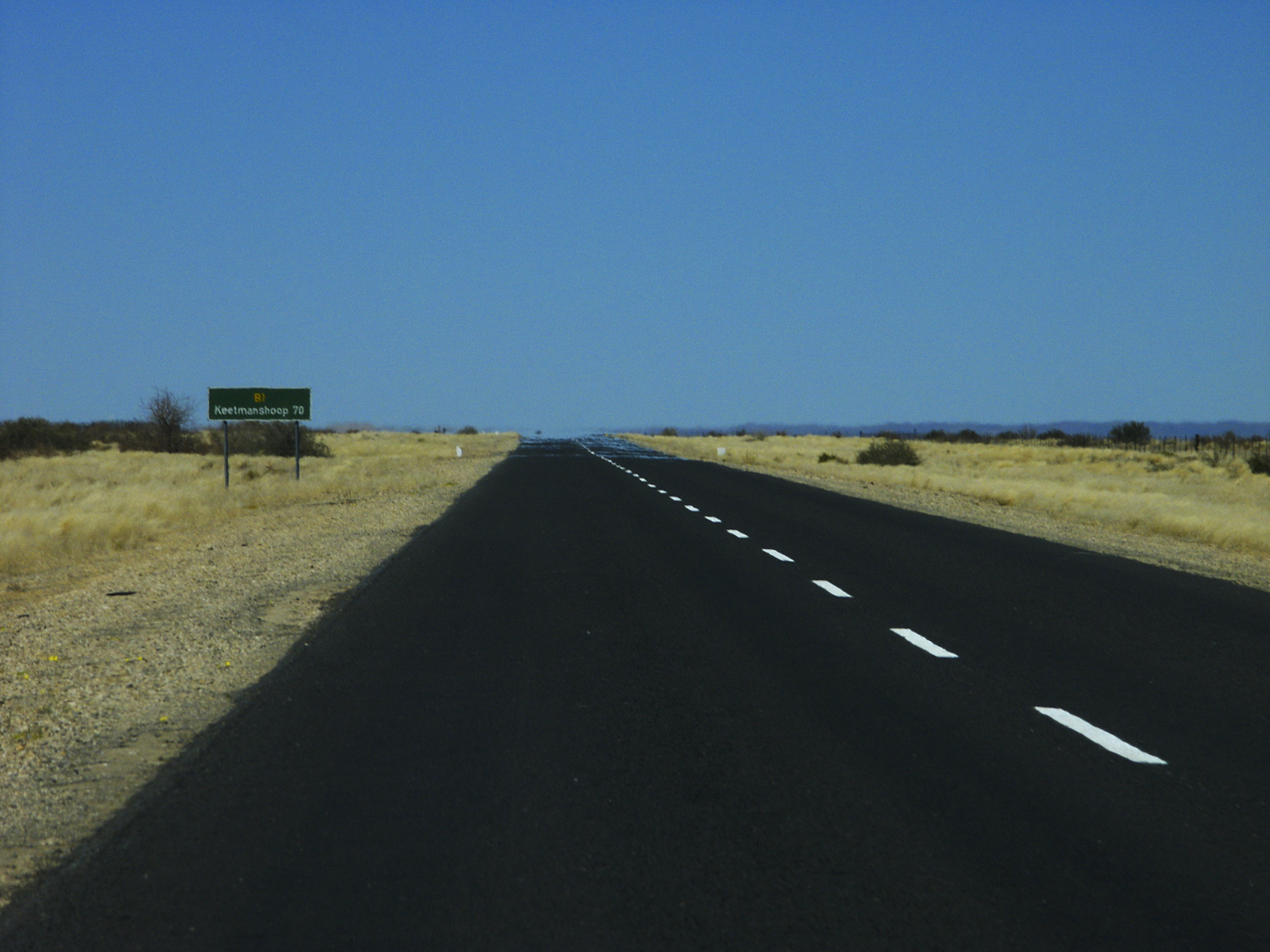 Die B1 - Hauptverbindungsstraße in Namibia.